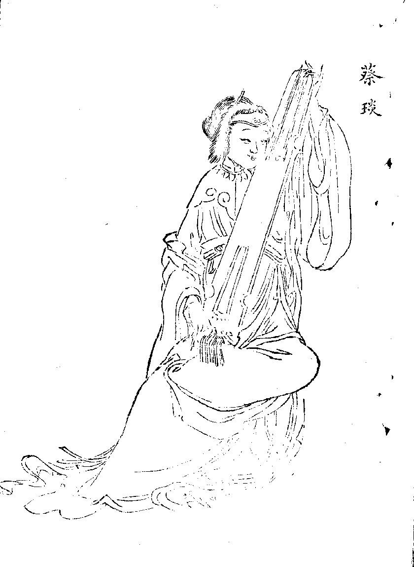 Cai Wenji